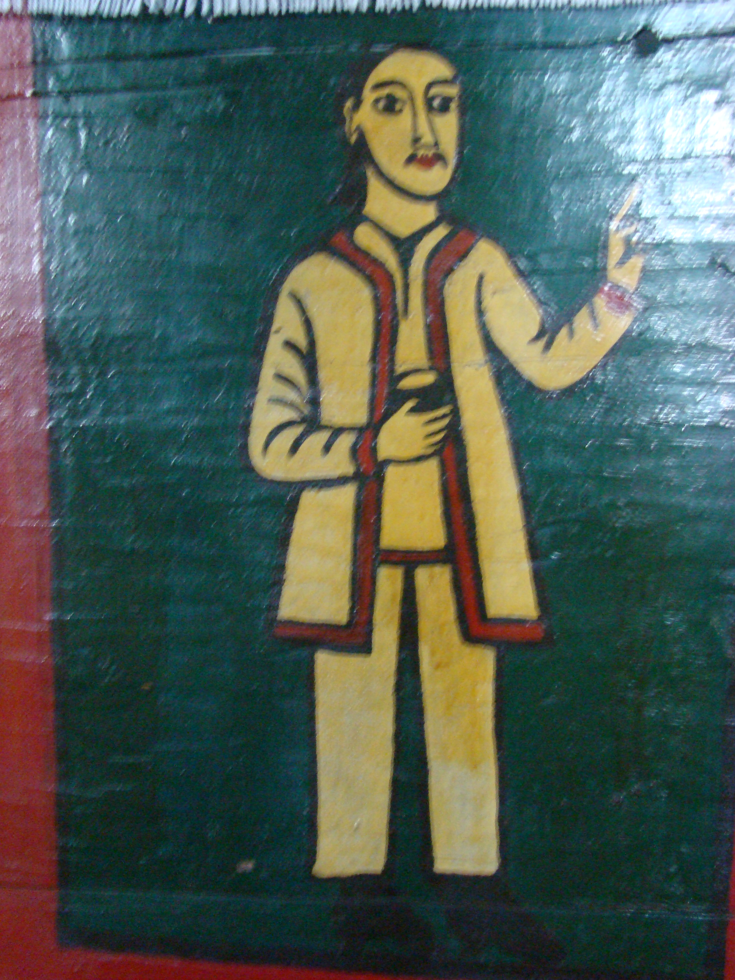 Biserica de lemn „Sf.Dumitru” din Păușa, județul Bihor